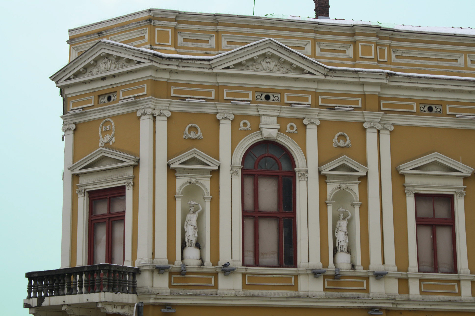 Зграда "Борова" у Шапцу.